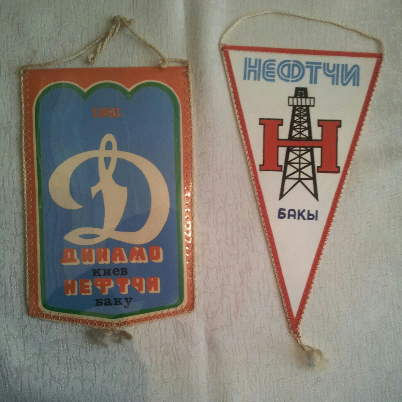 Neftçi klubunun atributikaları